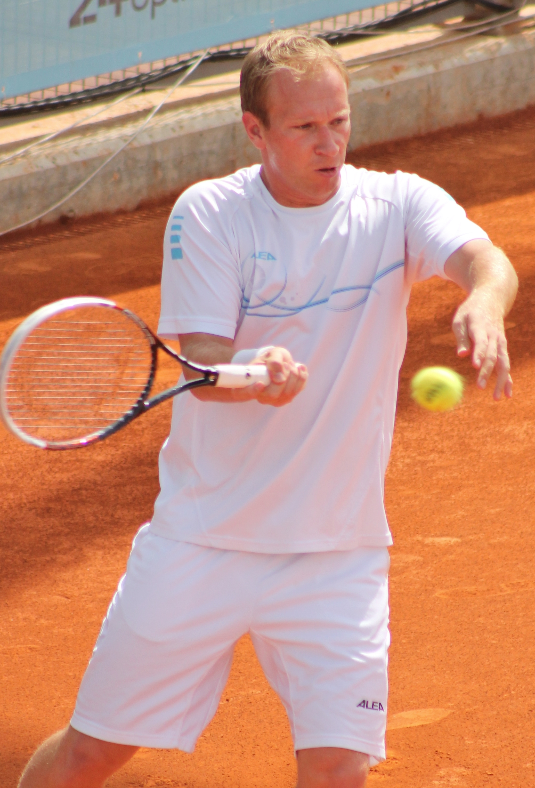 Dlouhy MA14 (3)